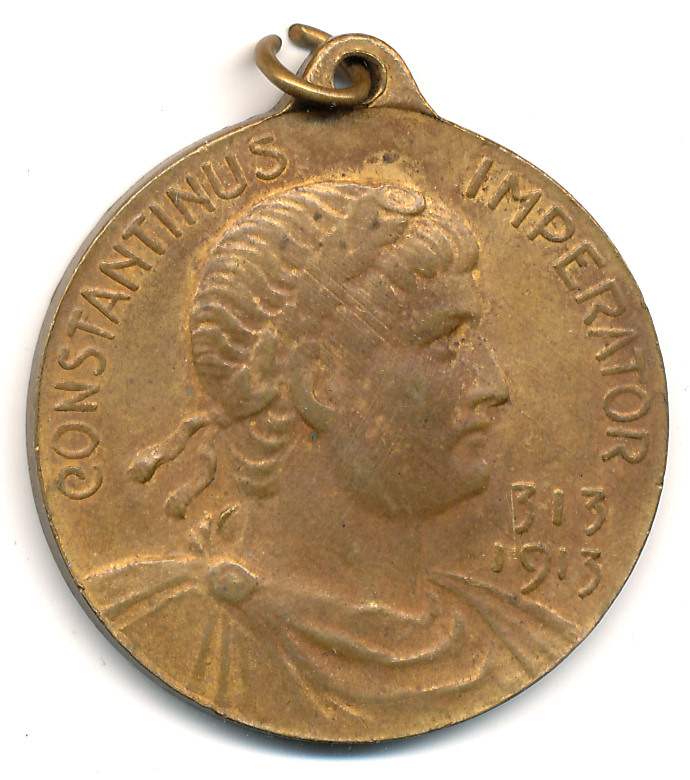 Médaille allemande frappée pour un pèlerinage à Metz en 1913, rappelant le 16ème centenaire de l'édit de Milan.